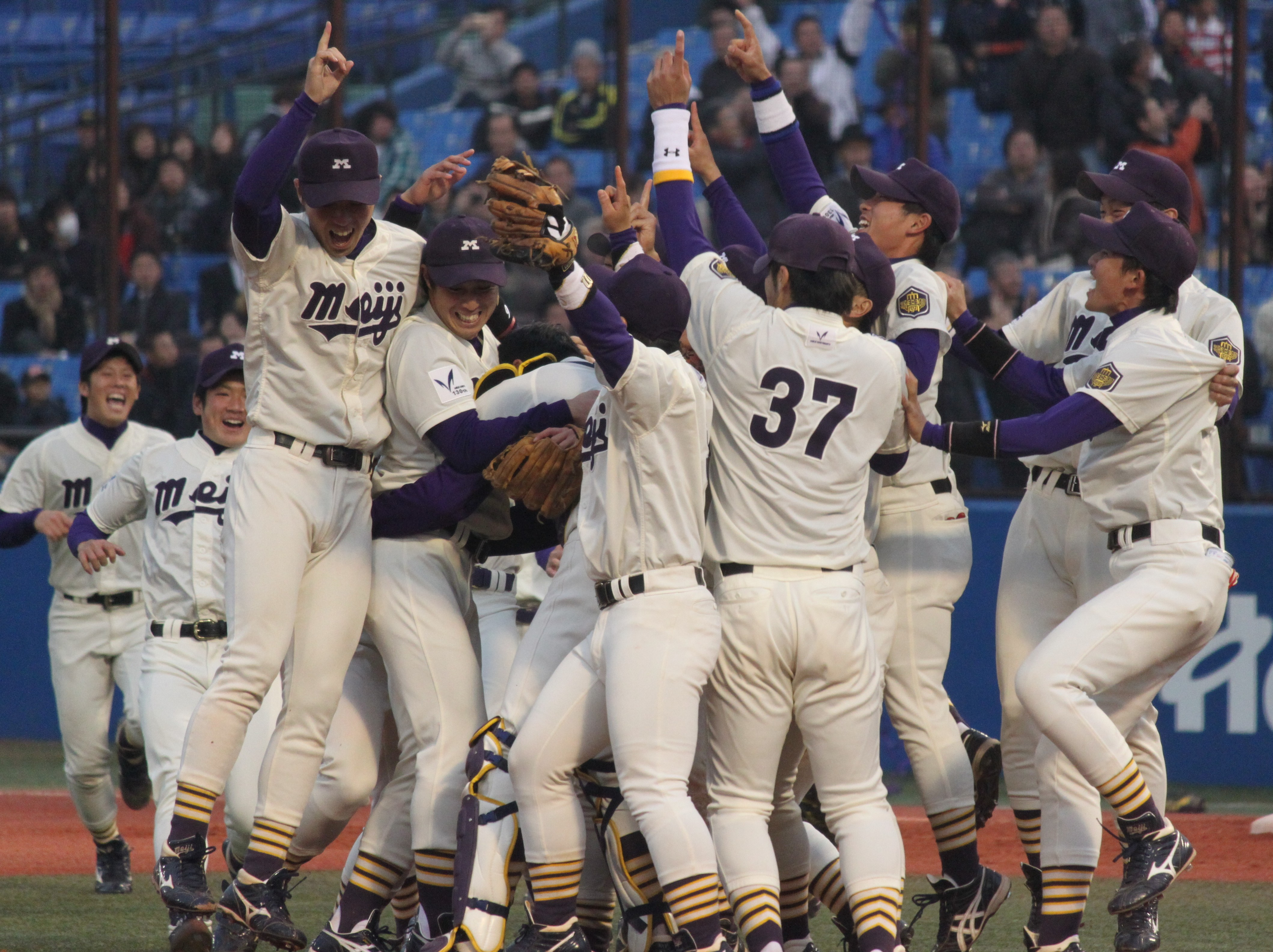 明治大学硬式野球部